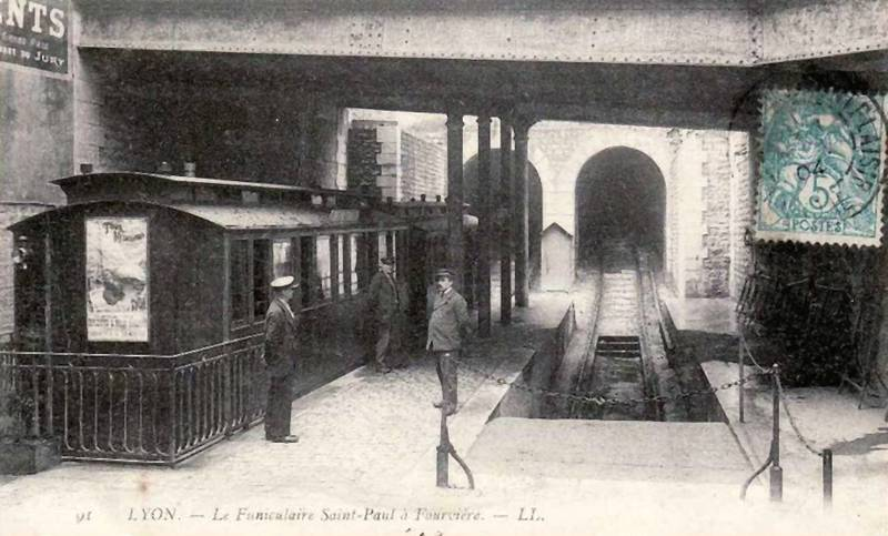 Ancien funiculaire Saint-Paul - Fourvière à Lyon